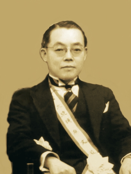 中文（台灣）: 大統領廖文毅